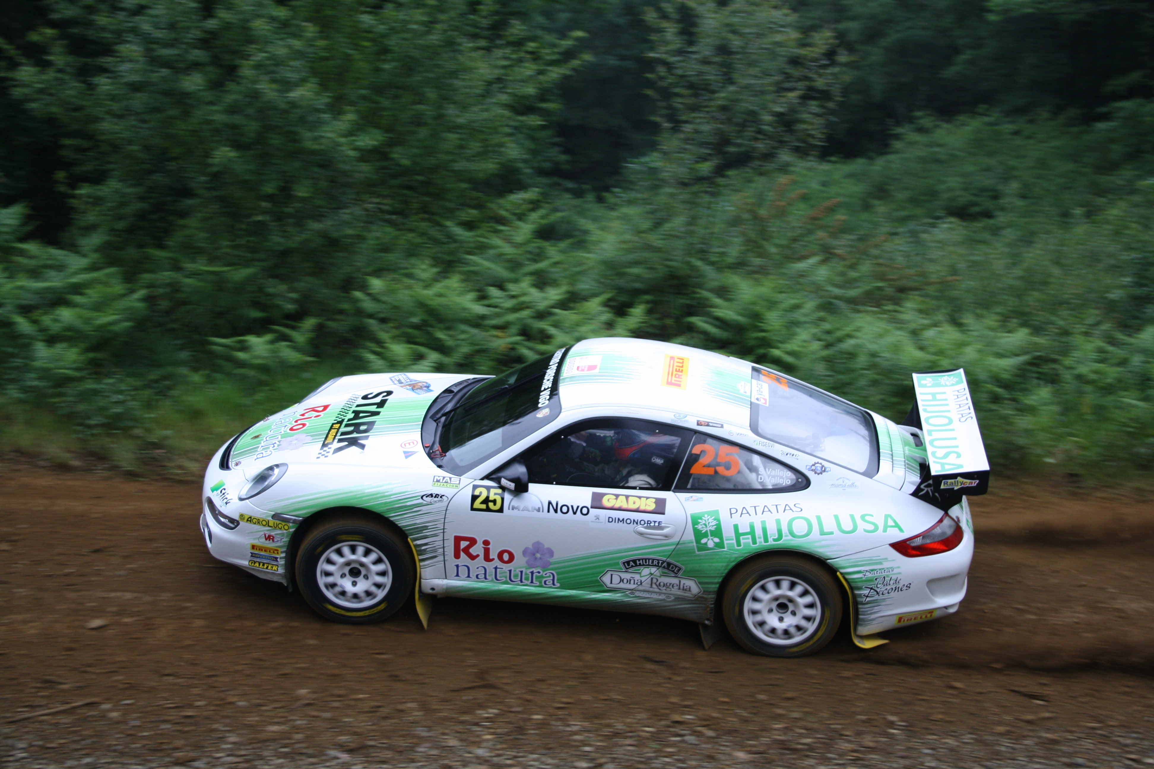 Rally Terra da Auga. Tercera prueba del campeonato de España de rallies de tierra 2018.